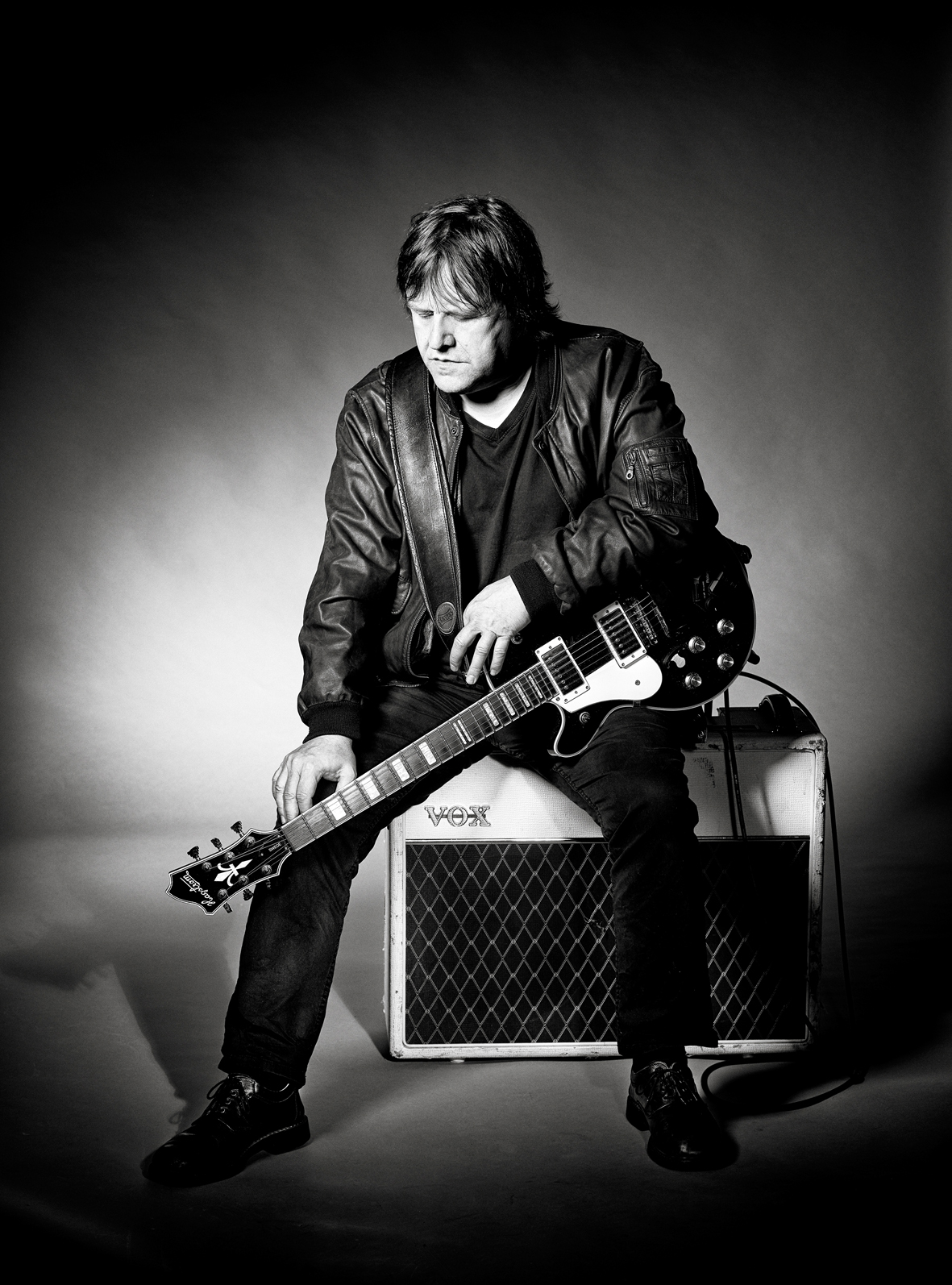 Plakatfoto zum Programm "1968 - Am Anfang war die Musik" von Manfred Pollert